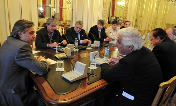 El jefe de Gabinete, Alberto Fernández, se reunió con representantes de la Sociedad Rural, Coninagro, Federación Agraria Argentina y CRA.